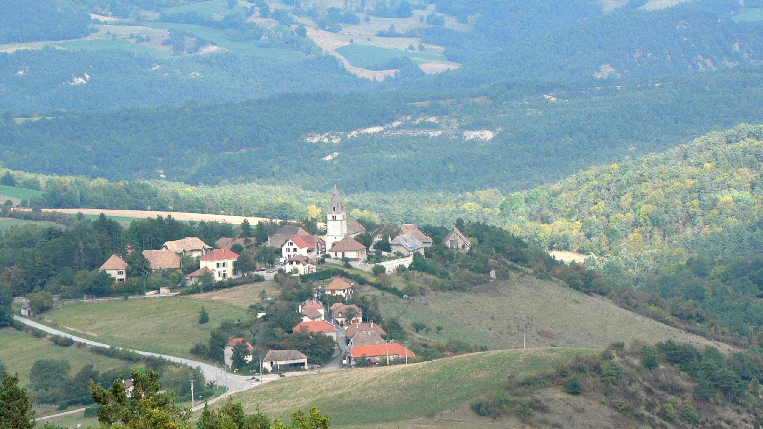 Le Percy (Isère)